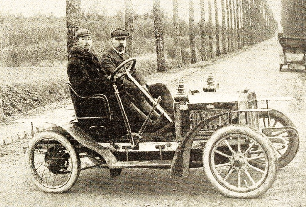 Jules Goux vainqueur au Ballon d'Alsace en 1906 - La Vie au Grand Air du 8 décembre 1906, p.903